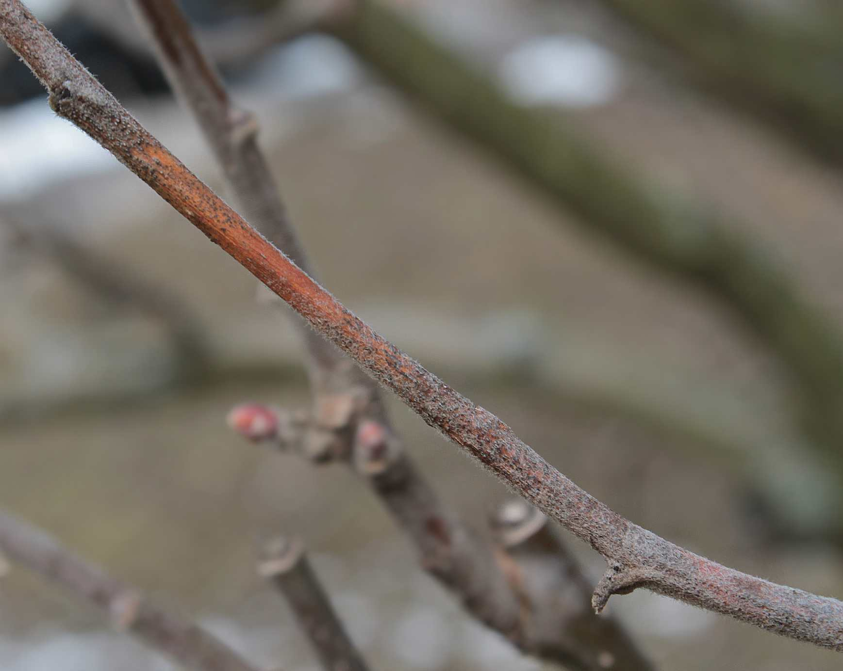 Nektriová rakovina je houbová choroba dřevin způsobená houbou hlívenka buková Nectria galligena, Brno-Komín